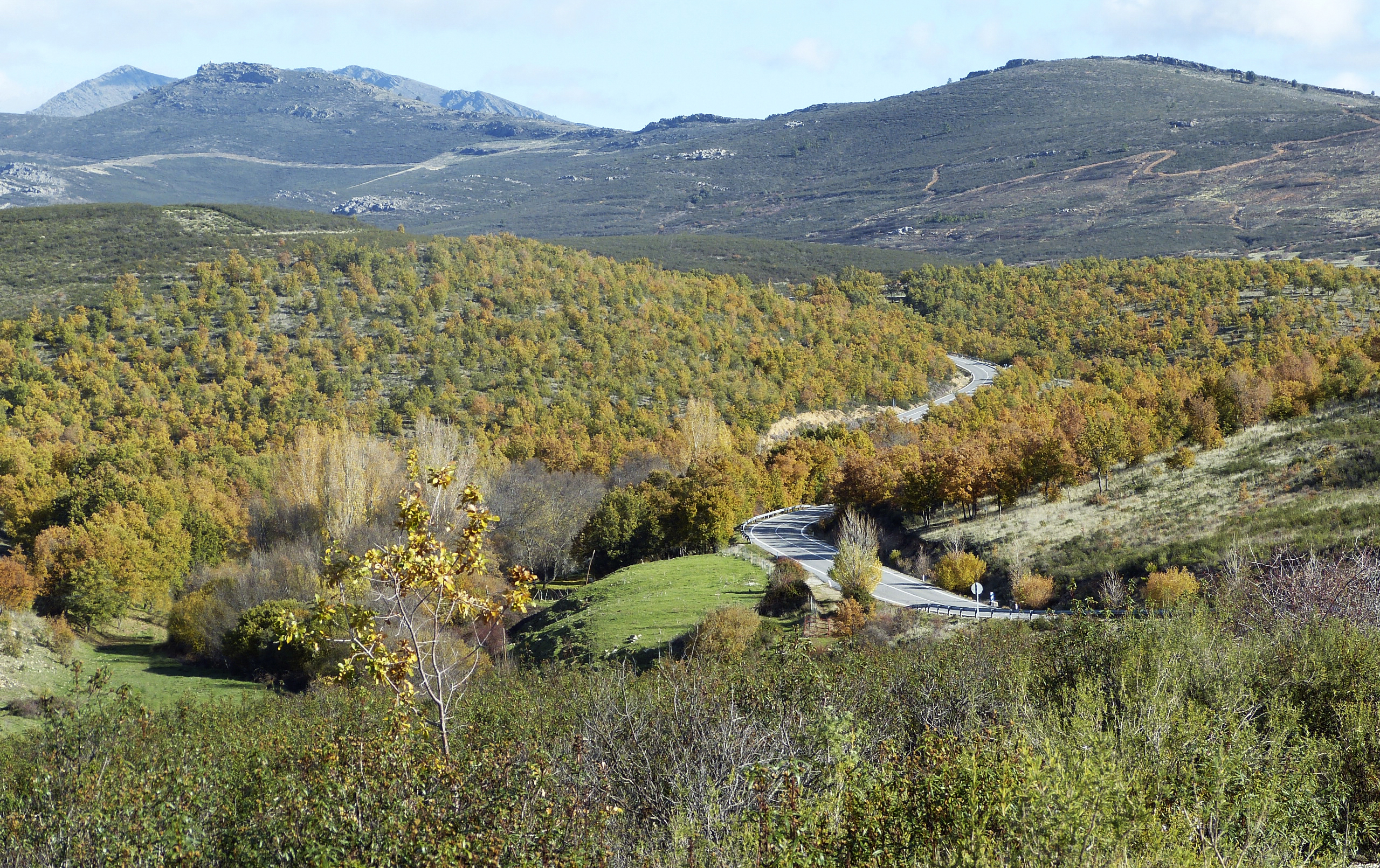 Panorámica del robledal de la Dehesa de Abajo de Robledillo de la Jara